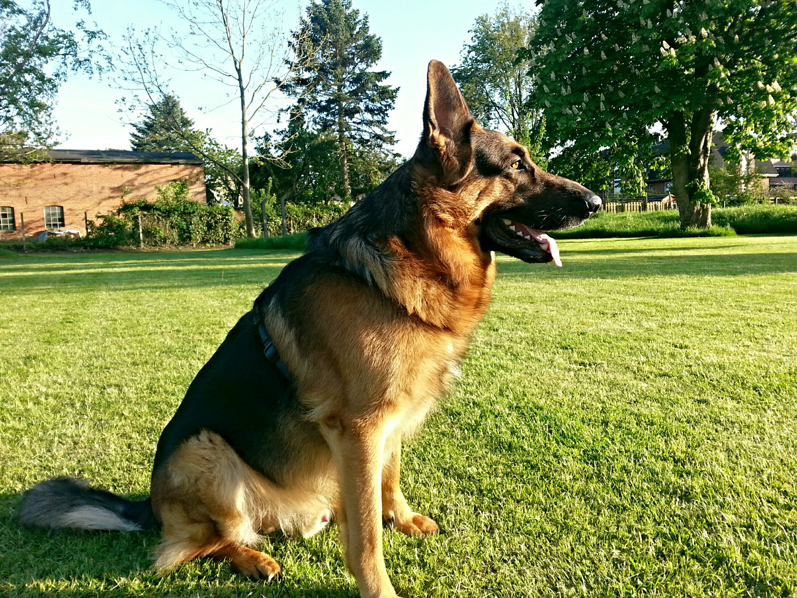 ausgewachsener Rüde, 51 kg schwer